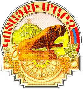 герб марза Котайк